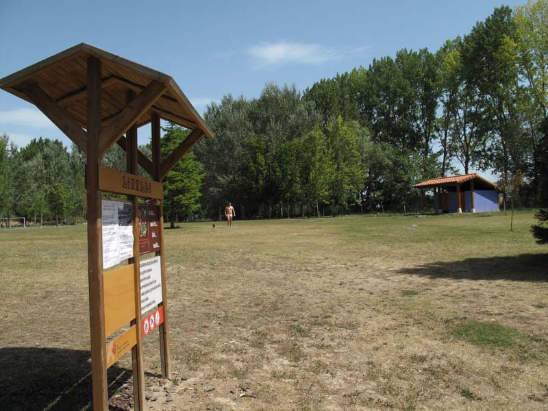 Parque de Linares, en Berantevilla (Álava)